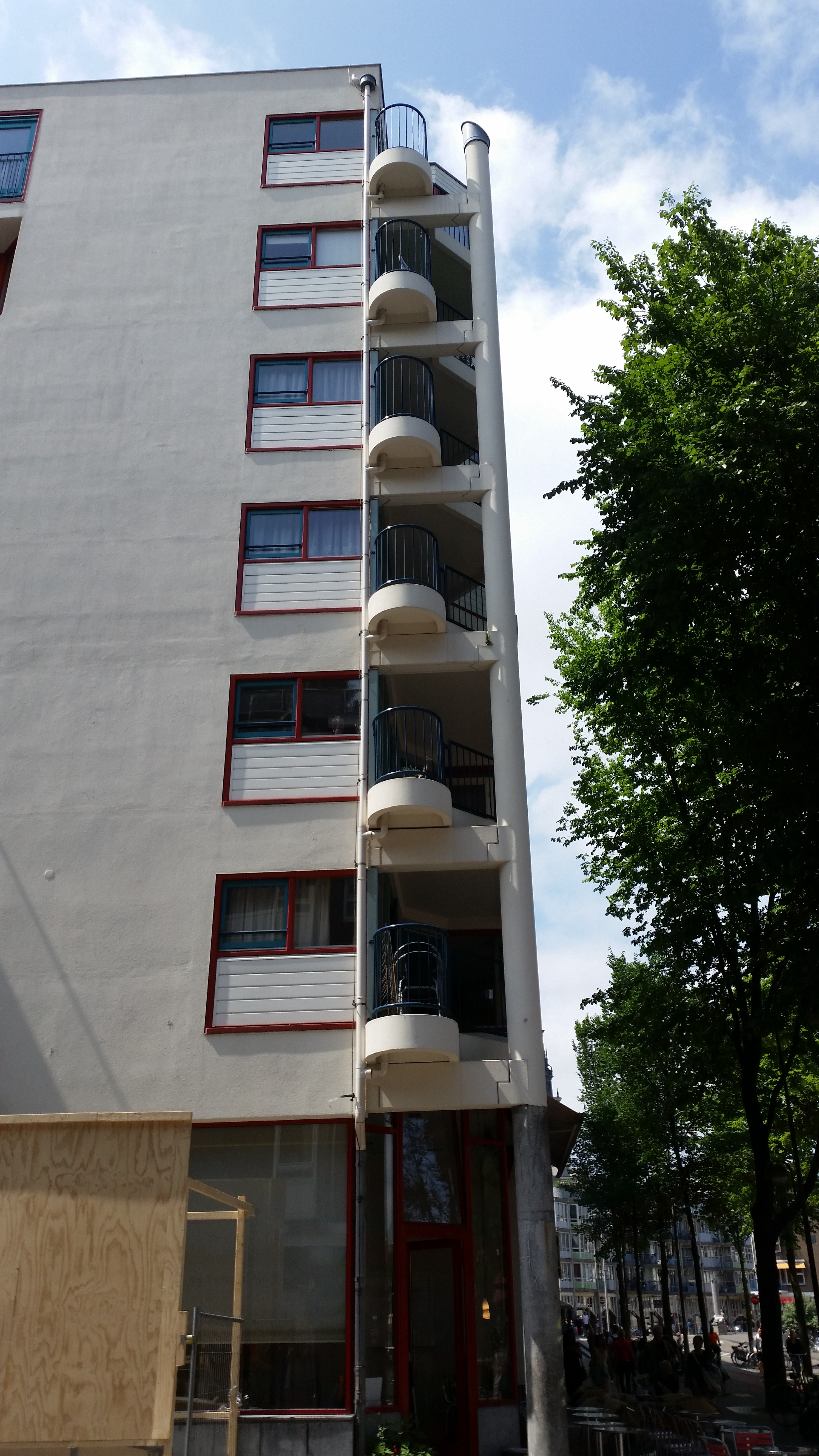 Gran Vista, Amsterdam, ophanging balkons